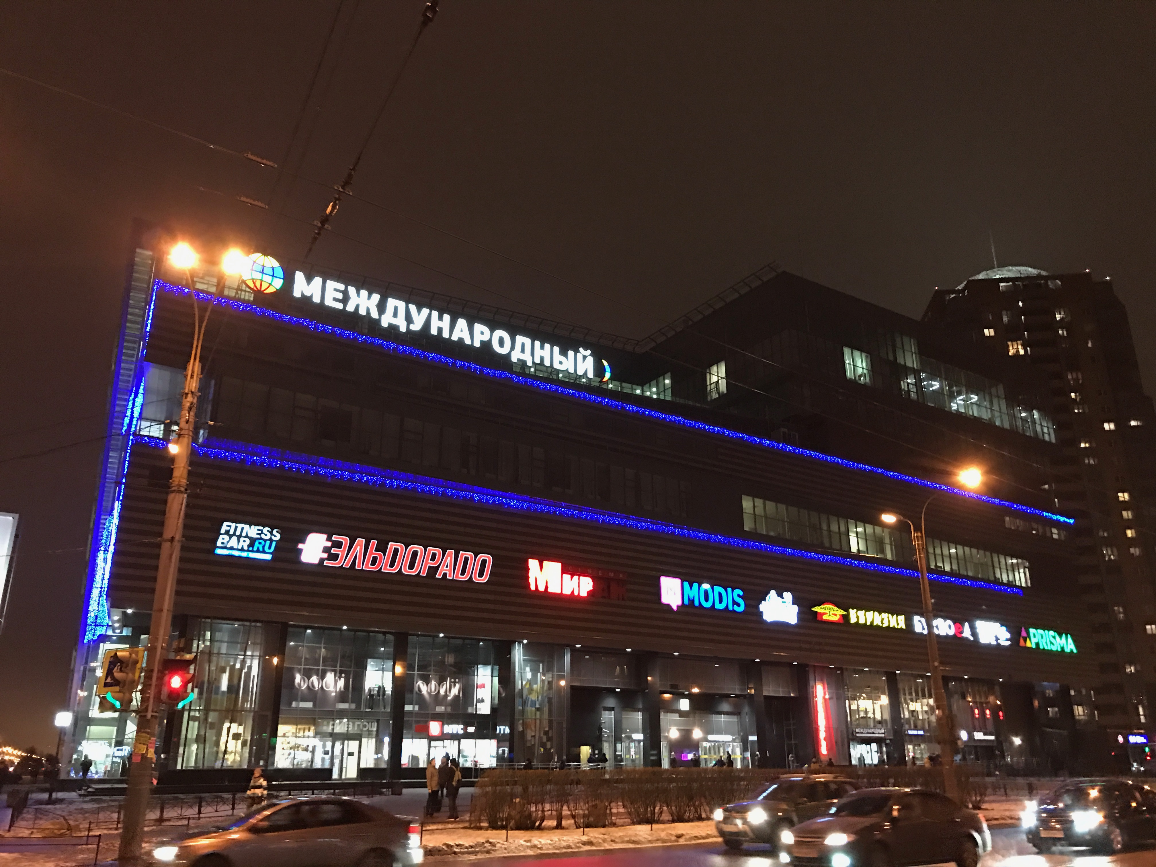 Международный